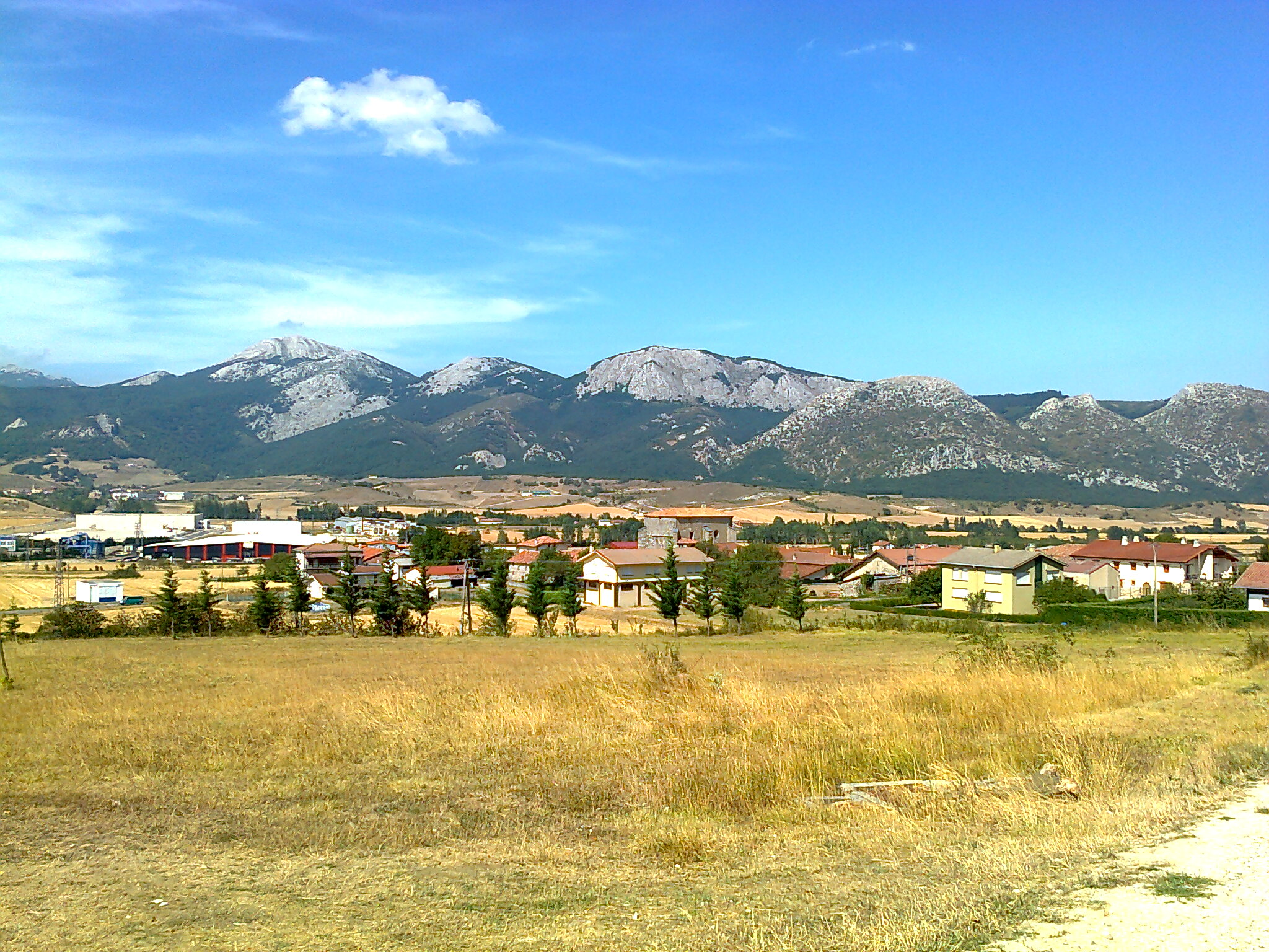 Durrumaren ikuspegia